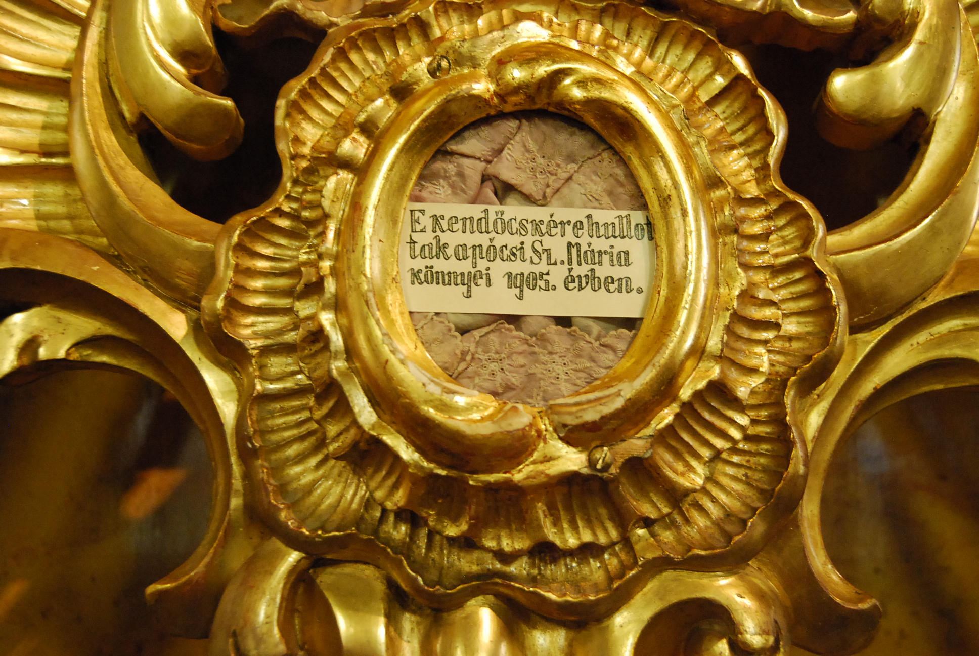 Máriapócsi kegytemplom ereklyéje